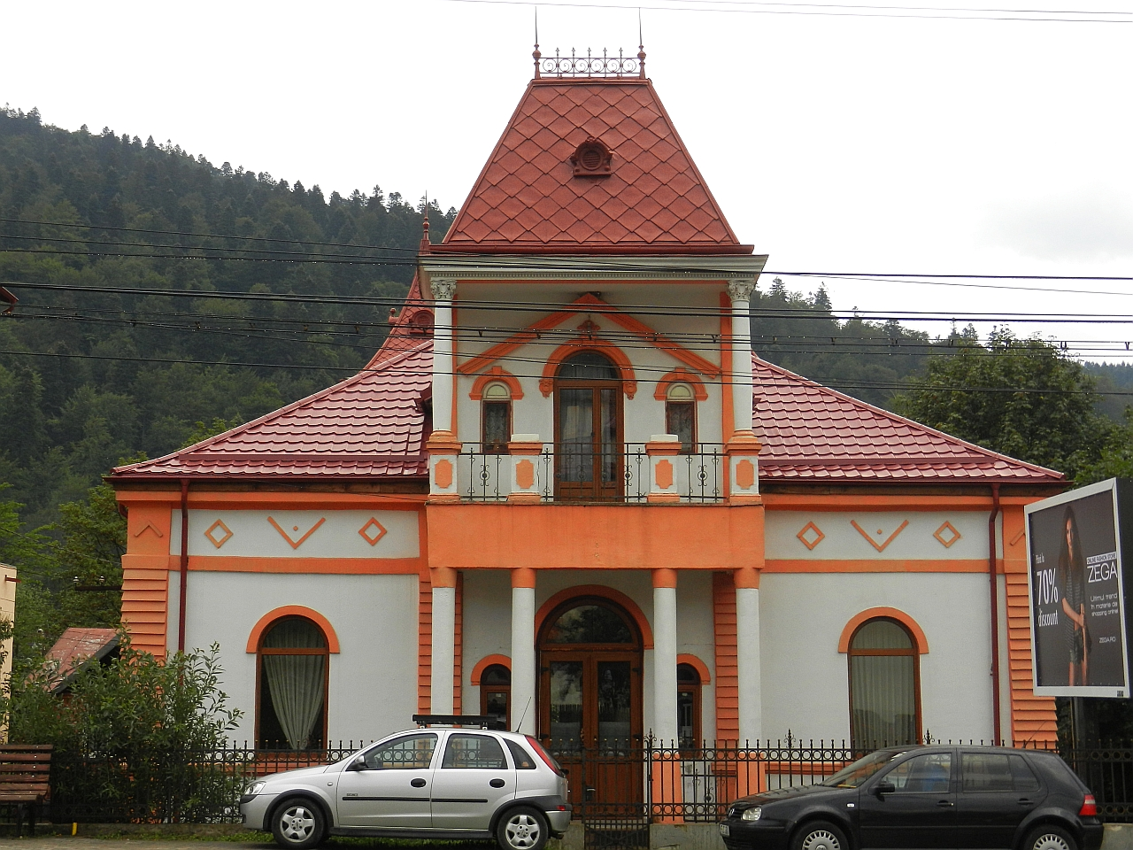 Casa Alexandru Popescu